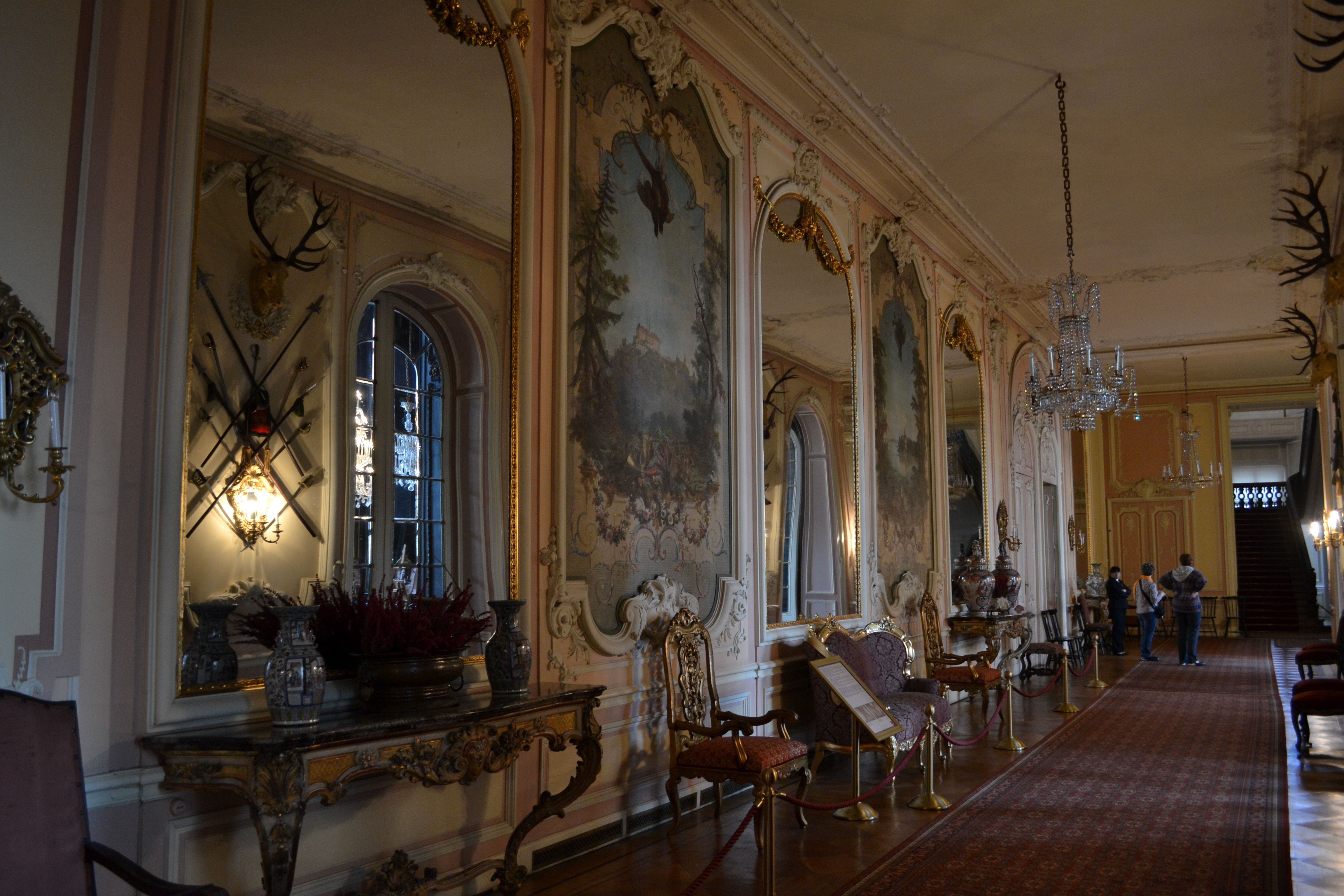 Pszczyna, pałac, ob. Muzeum Zamkowe, XVII w., XX w.